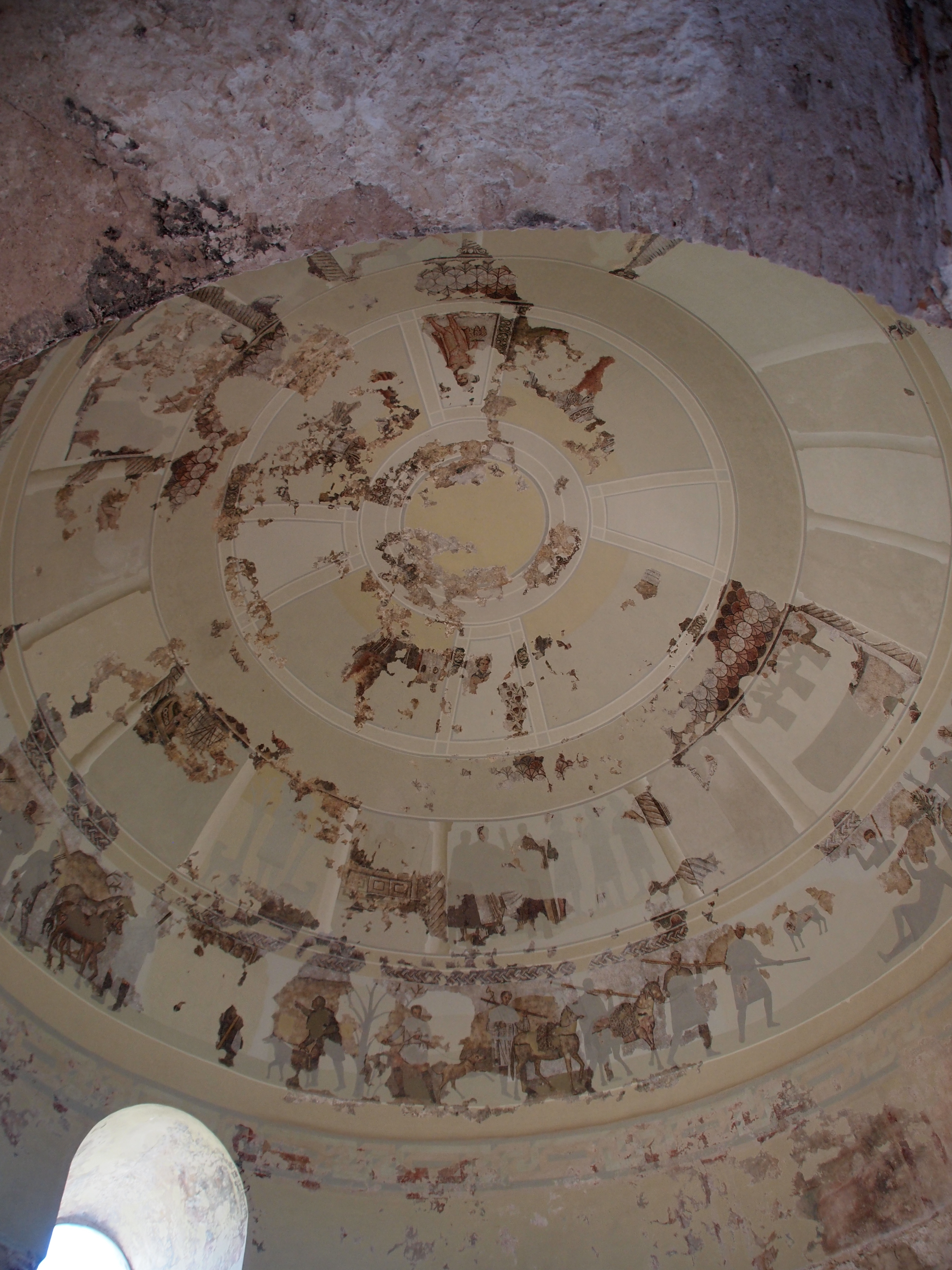 Vista de la cúpula con los mosaicos